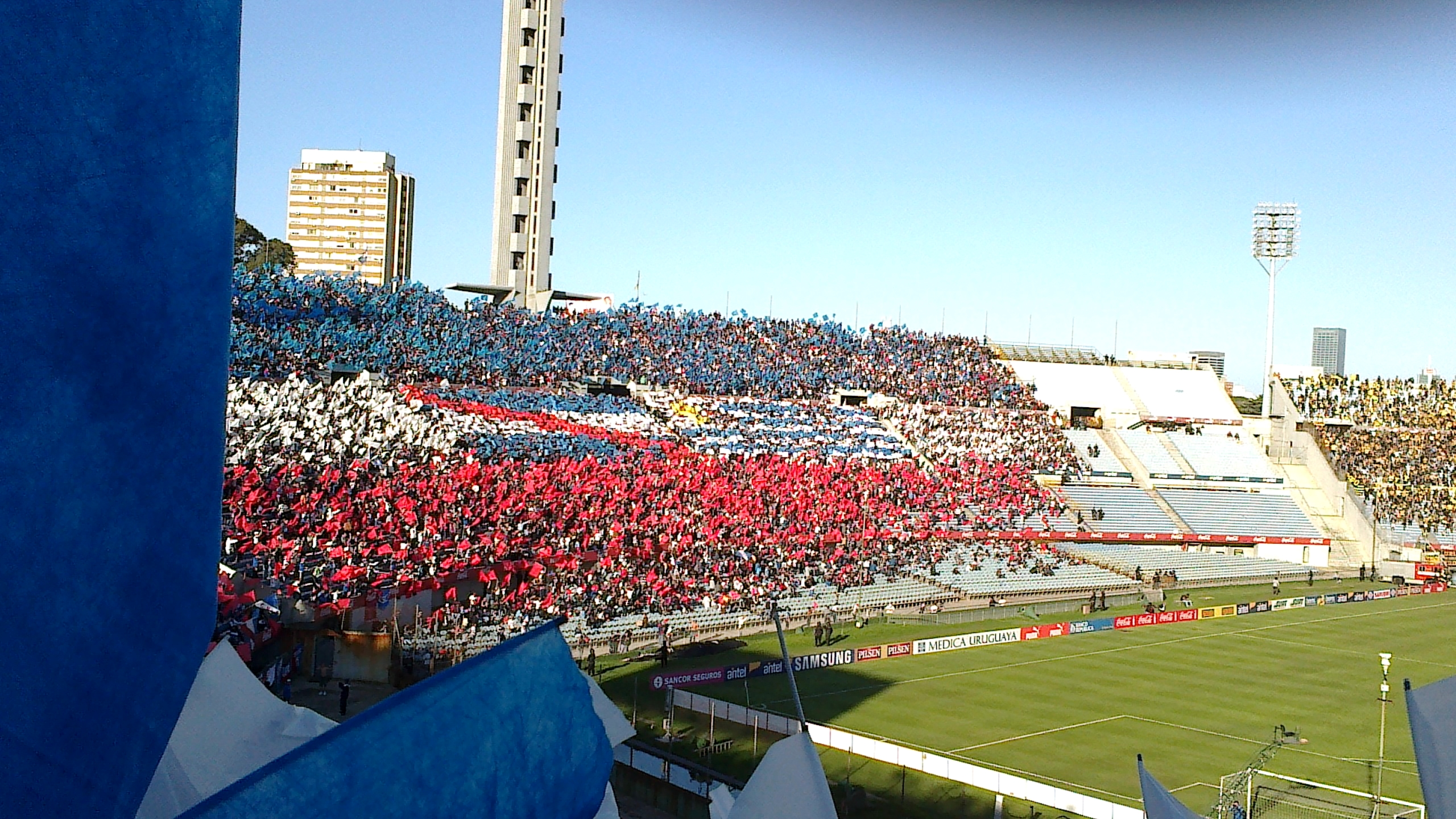 Nacional Clasico